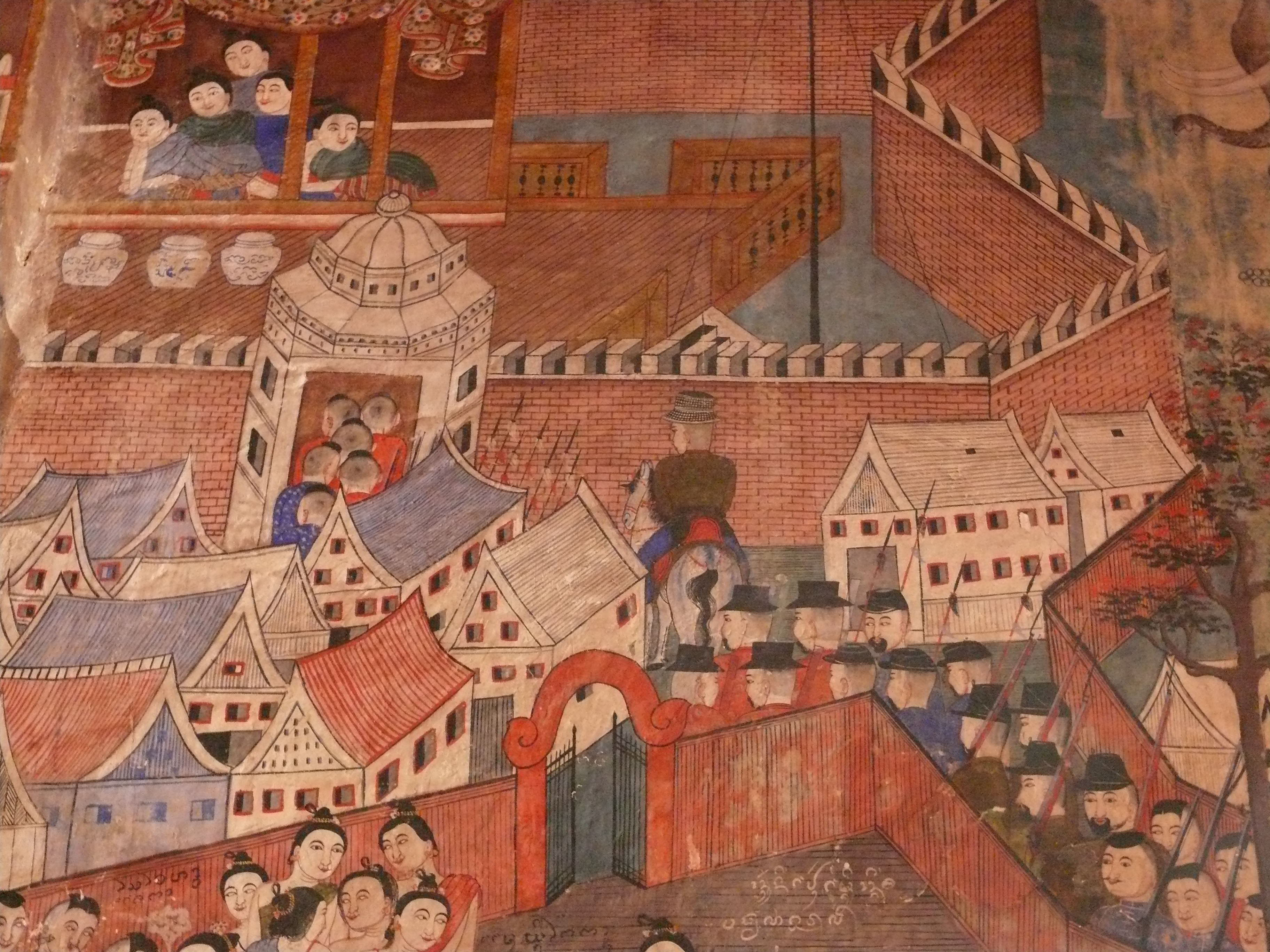 Peinture_murale_Wat_Phumin,_Nan.JPG